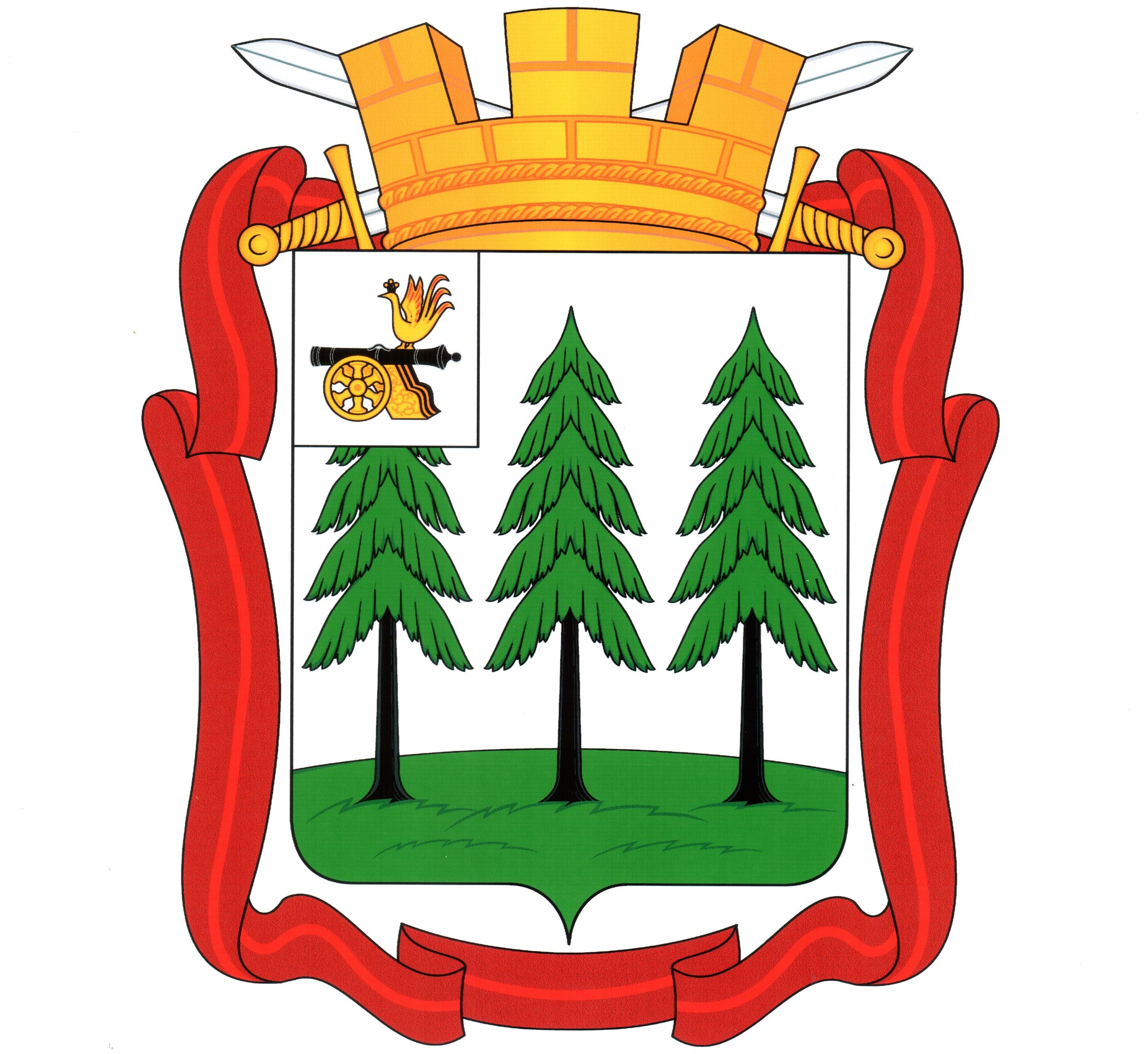 Герб города Ельни, Смоленской области.